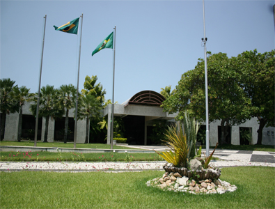 Foto do Palácio Iracema